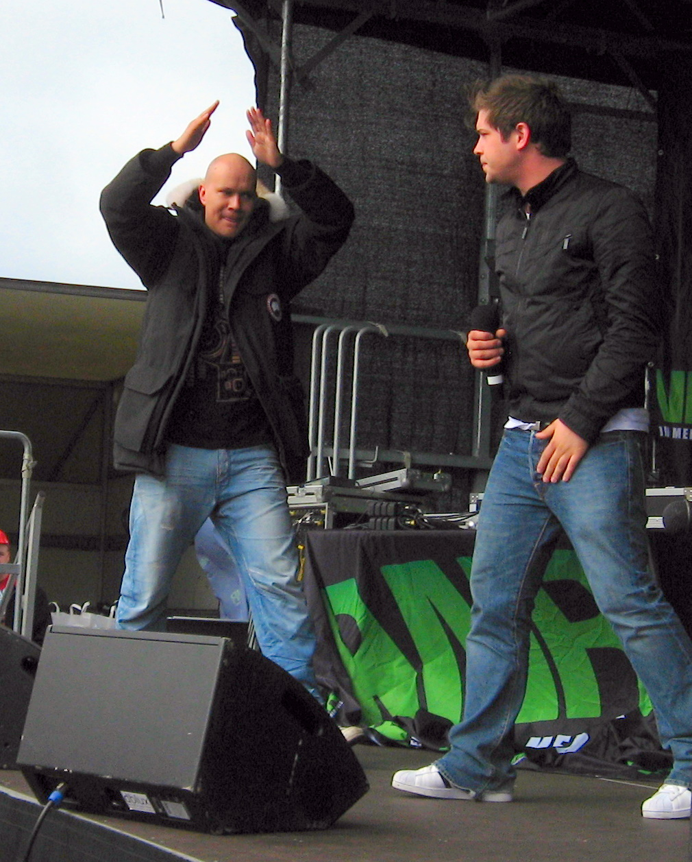 Kato og Jon Nørgaard @ Skovmand & Bues Fødselsdag i Hirtshals